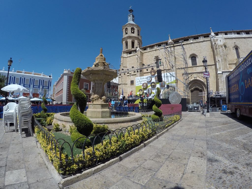 Iglesia de Nuestra Señora de la Asunción